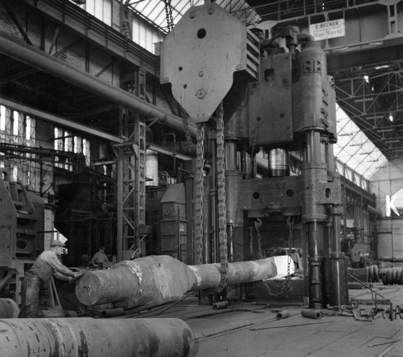 Das Schmieden einer Kolbenstange für einen Groß-Kompressor von einem 10 t Block unter einer 3-zylindrischen 2 500 t reinhydraulischen Schmiedepresse der Borsig Aktiengesellschaft, Berlin-Tegel